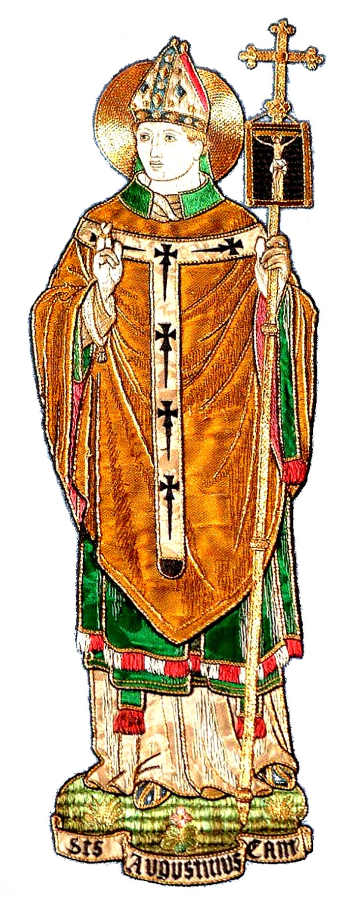 St. Agustí de Canterbury en un brodat